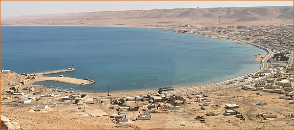 issu de mon site